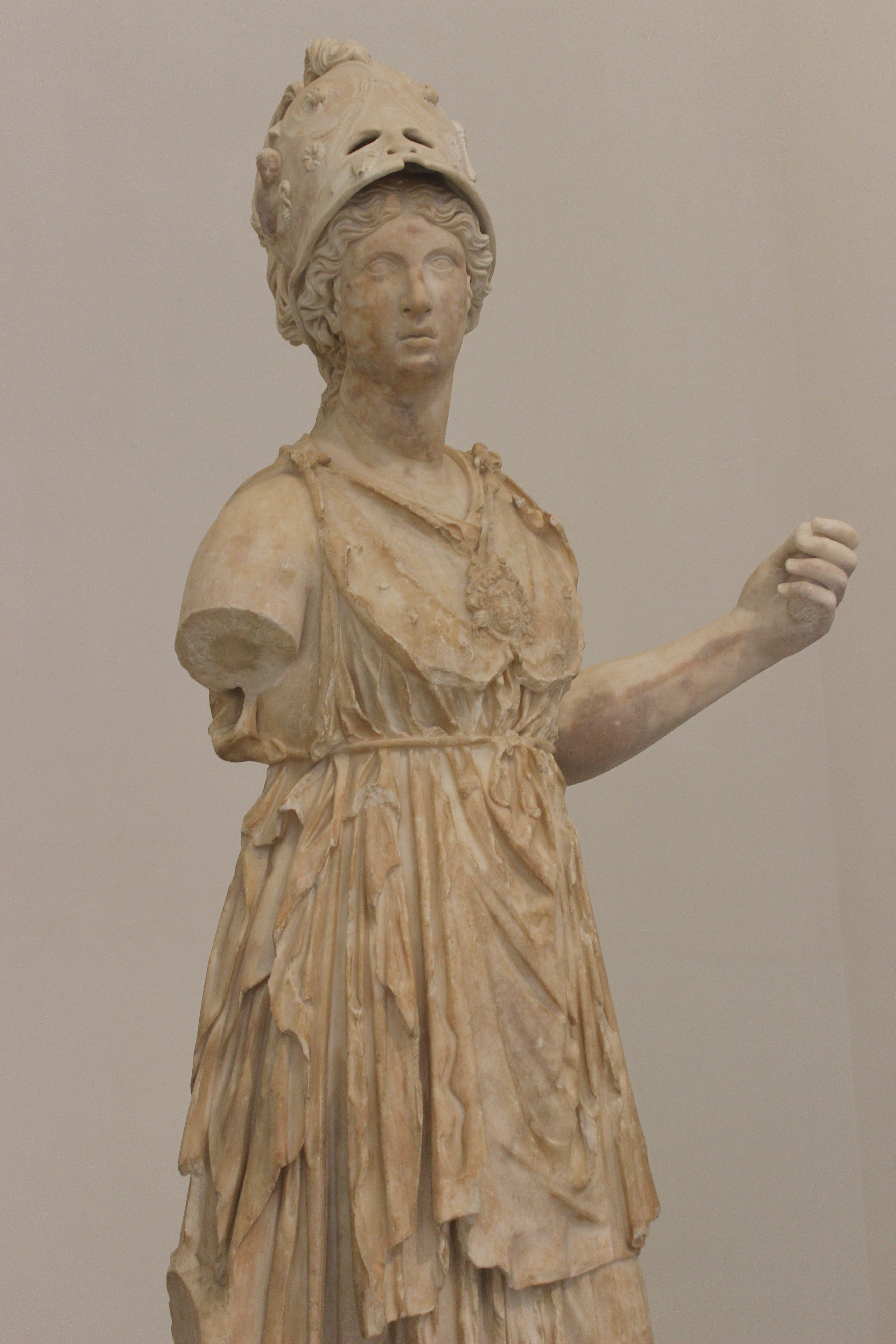 Nápoles. Museo Arqueológico Nacional. Minerva Farnese.